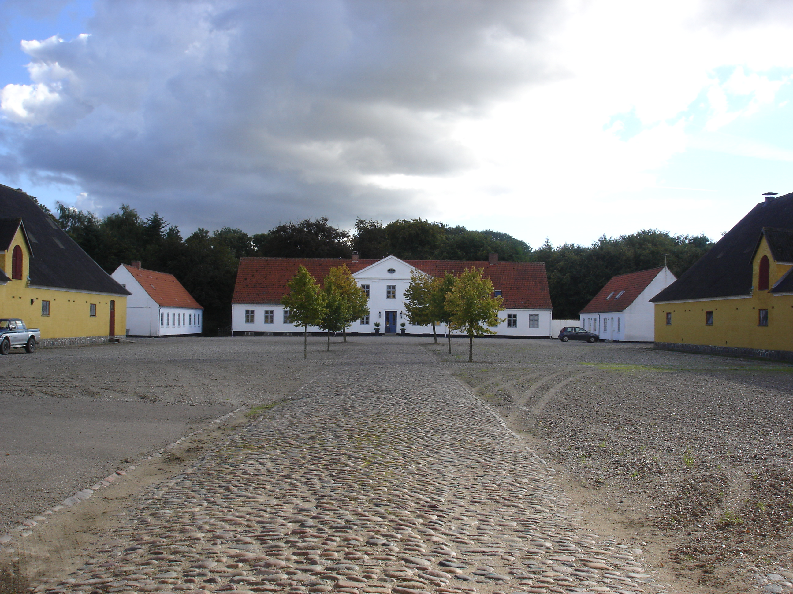 Løvegård, hovedbygningen